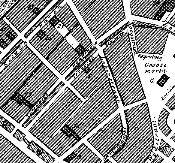 fragment van de kaart van Gouda